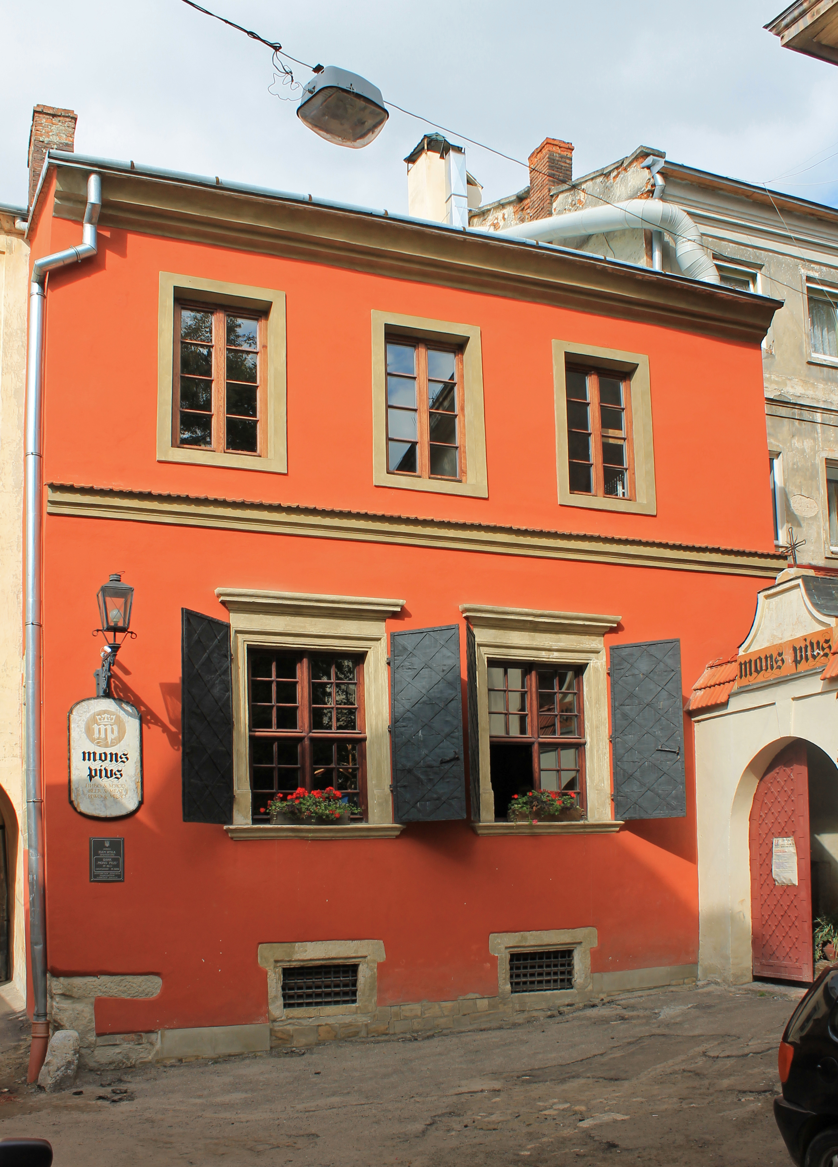 вул. Вірменська, 7/9, м.Львів